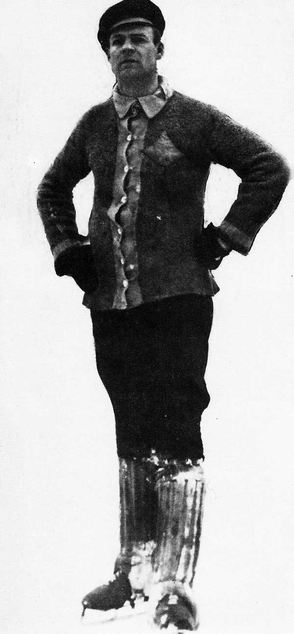 Sven "Sleven" Säfwenberg